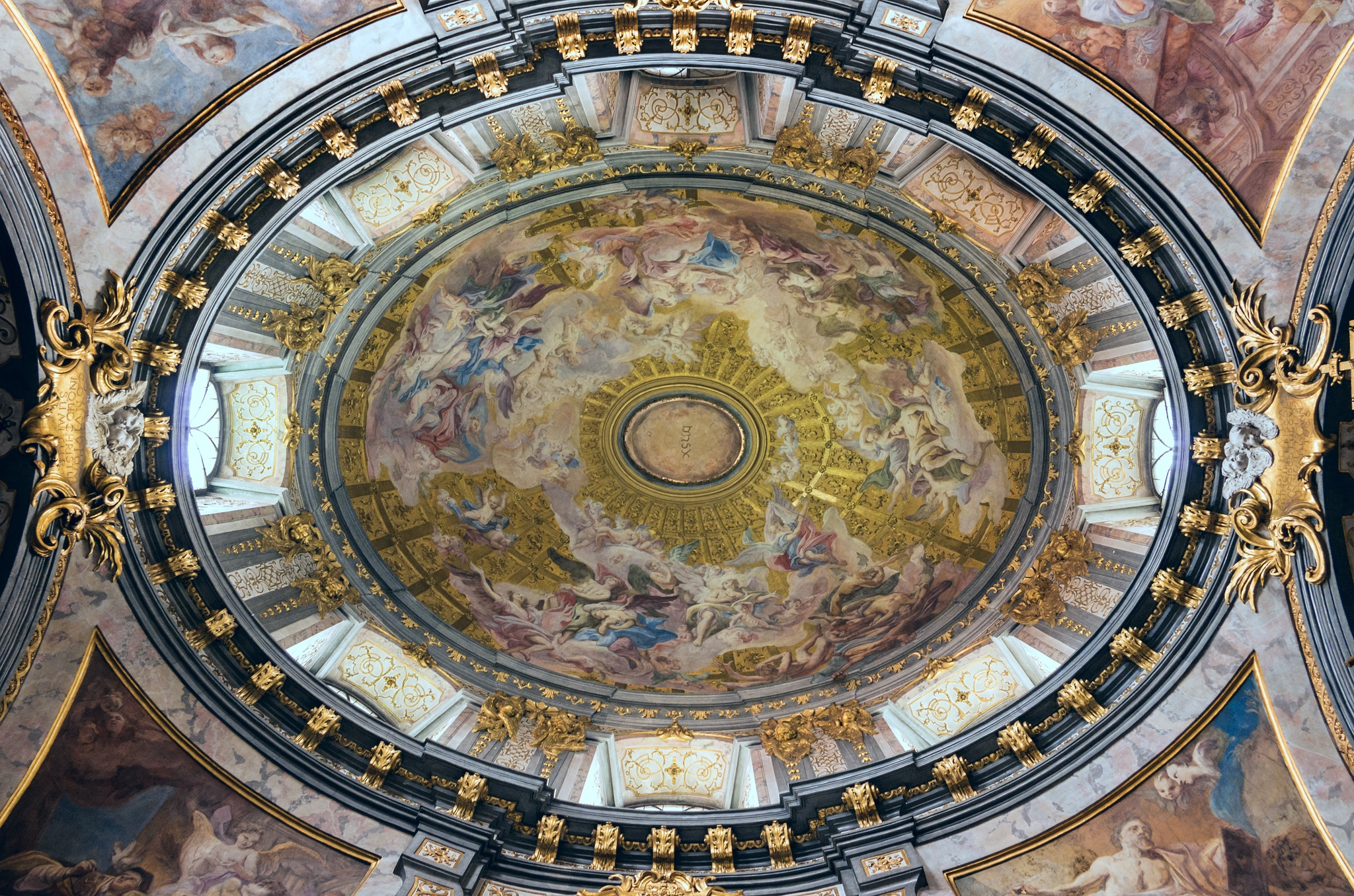 Katedra św. Jana Chrzciciela we Wrocławiu, kaplica Bożego Ciała - malowidła na suficie